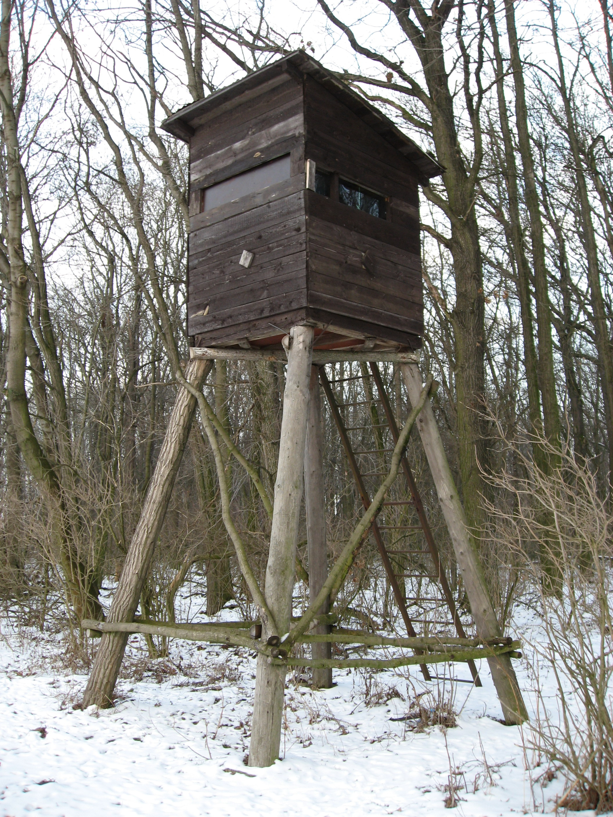 Posed u Modřic